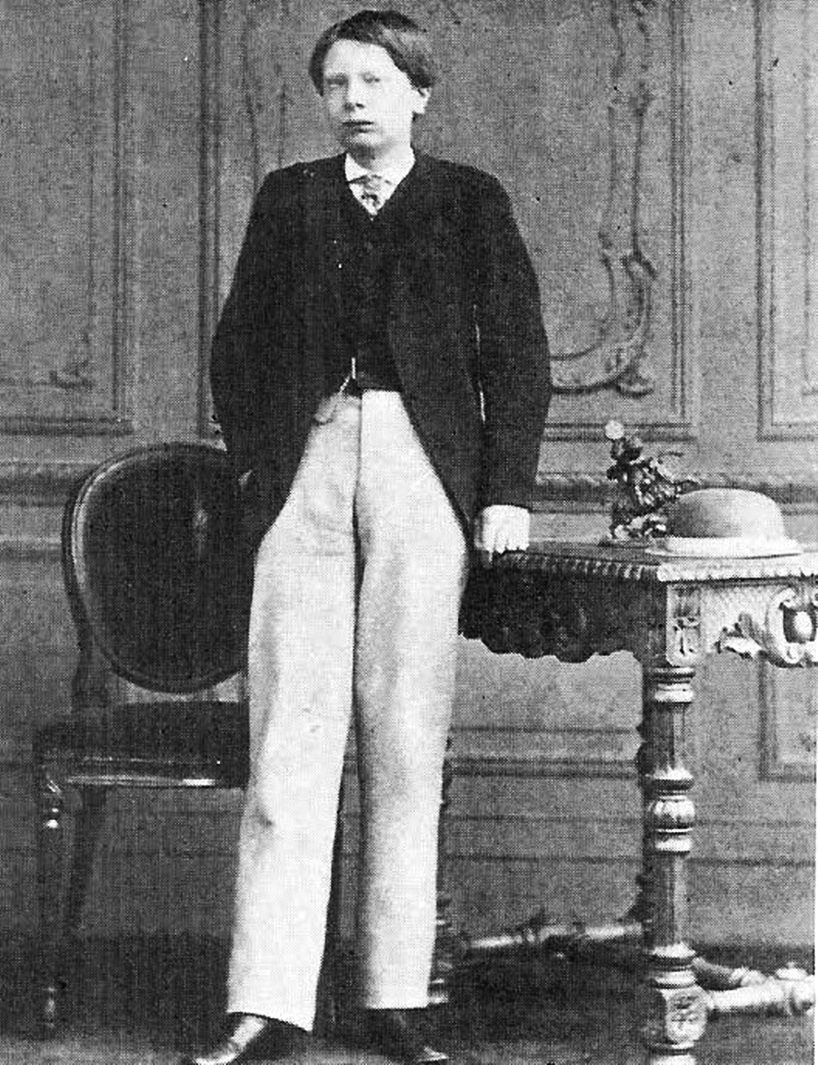 Foto van de Nederlandse kroonprins Alexander (overleden 1884). Foto gemaakt omstreeks 1866, eventueel berustende auteursrechten verlopen. De foto bevind zich onder andere in het Koninklijk Huisarchief, Den Haag. Foto gemaakt door M. Verveer, Den Haag. Afbeelding komt in meerdere publicaties voor. Deze versie gevonden op alwaar het zonder auteursrechten gekopieerd mag worden.